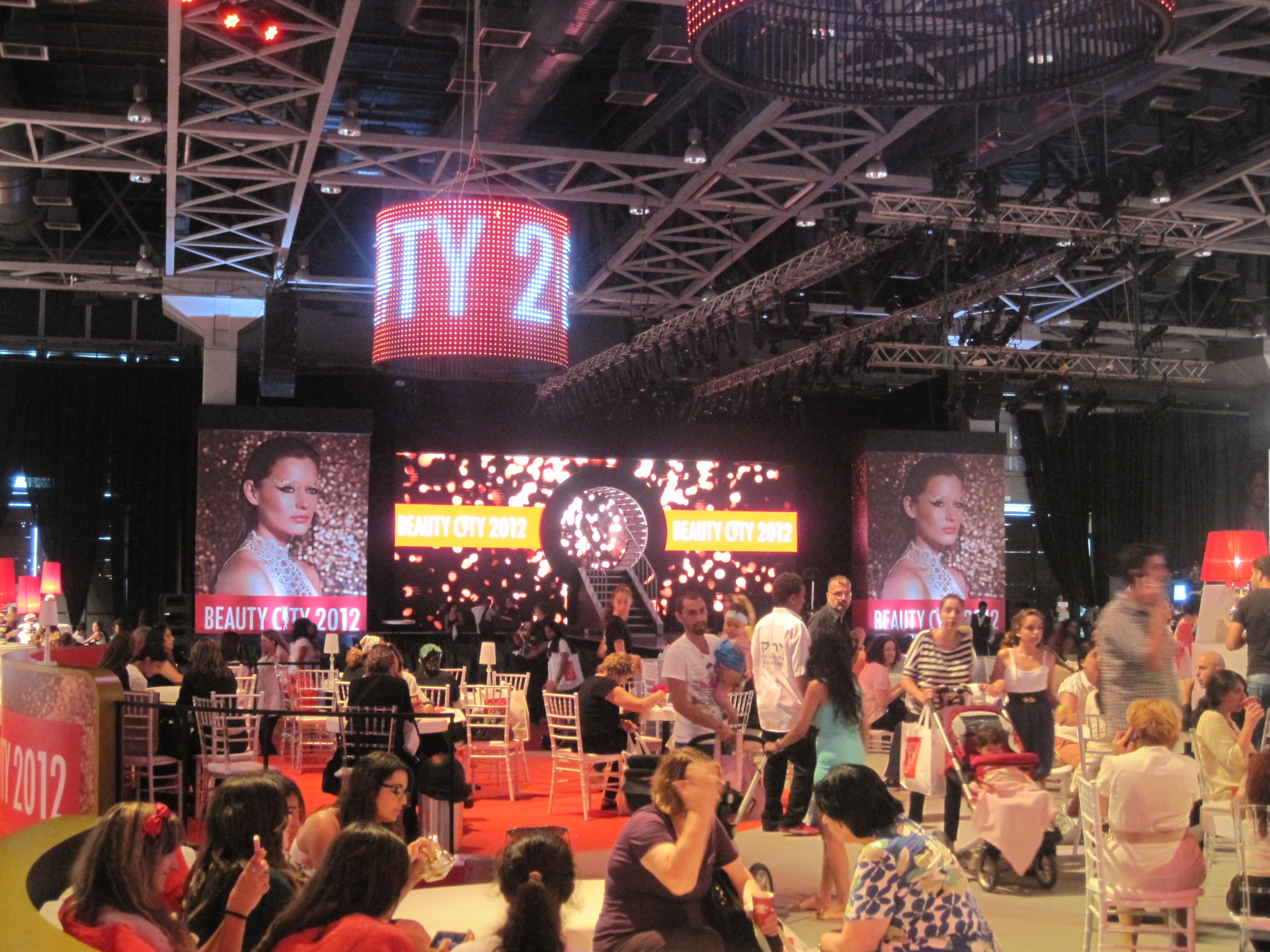 אירוע "ביוטי סיטי" של הרשת בגני התערוכה בתל אביב (2012)